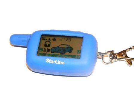 2-way car alarm, remote control, StarLine